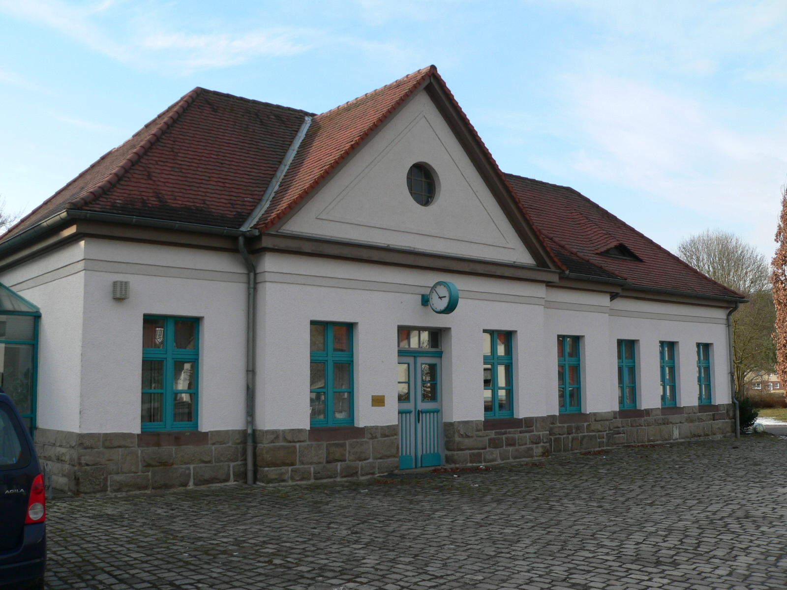 Ehemaliger Bahnhof der Carlsbahn in Trendelburg Fotograf: selbst fotografiert Datum: 12.02.2006